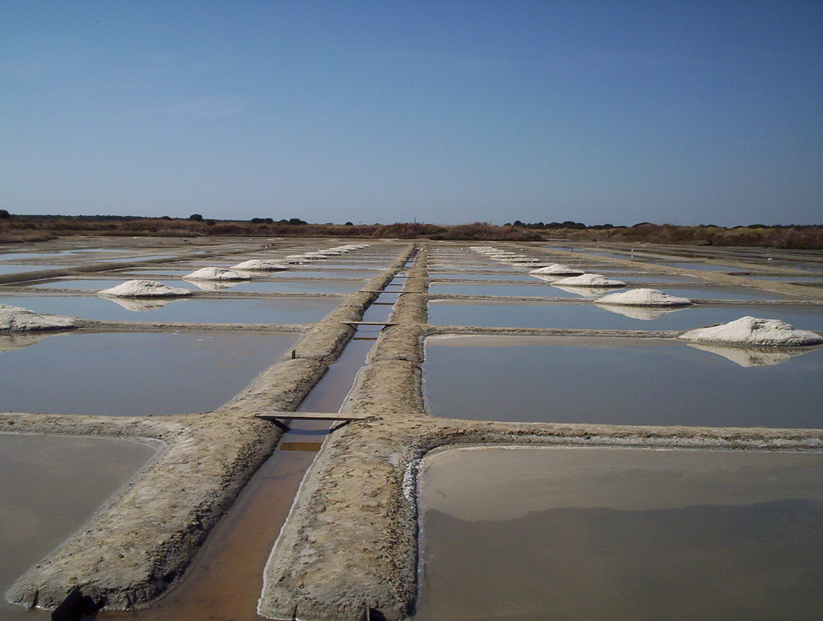 Marais Salants de la presqu'île guérandaise